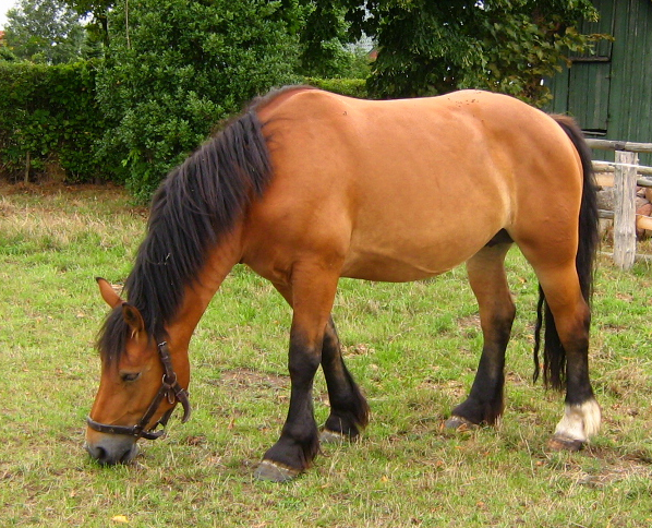 Pferd im Freilichtmuseum Klockenhagen, Ribnitz-Damgarten im Landkreis Nordvorpommern, Mecklenburg.